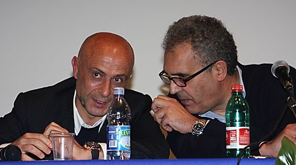 Nicola Adamo & Marco Minniti